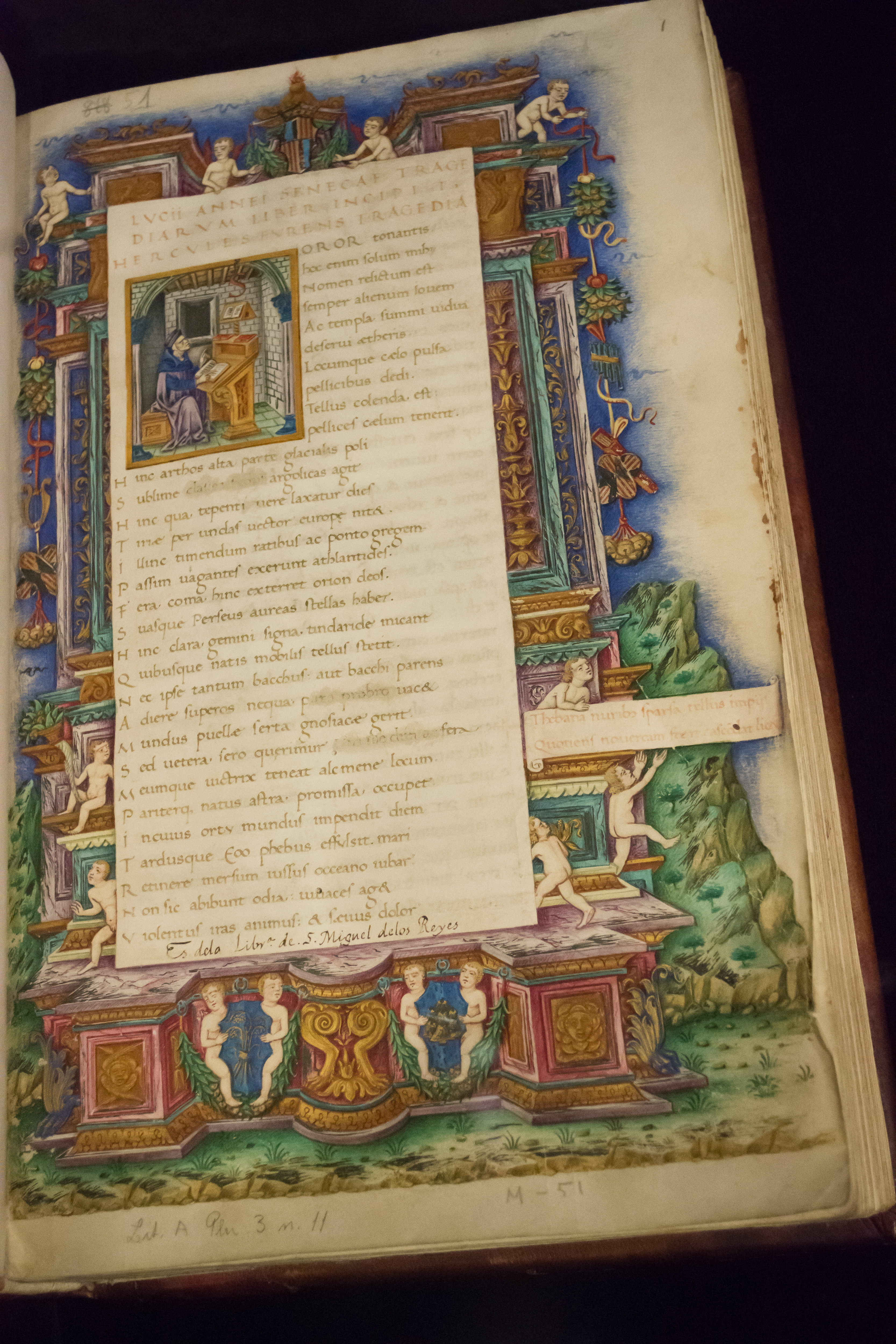 Códice en vitela escrito en Florencia en 1484 por Antonio Sinibaldi y miniado en Nápoles por Cristofor Majorana. Transcribe las tragedias de Séneca. Decoración: orla arquitectónica, miniada en colores y compuesta por cuatro cuerpos. Decoración de candelieri en las pilastras y en las retropilastras, rematadas por capiteles con esfinges o harpías. En la parte superior, escudo de los soberanos de Nápoles. La miniatura del folio 1 representa al autor. Al comienzo de cada tragedia se incluyen letras capitales en oro sobre fondo de colores. Encuaderanción: siglo XV. conserva la piel roja original, sobre madera, decorada con volutas y pequeñas flores en negro. Restos de cierres metálicos. Cantos dorados. 172 folios. 321 x 200 mm, encuadernación 340 x 215 mm. Idioma; latín. Colección Duque de Calabria. Universidad de Valencia. Biblioteca Histórica. BH Ms. 51